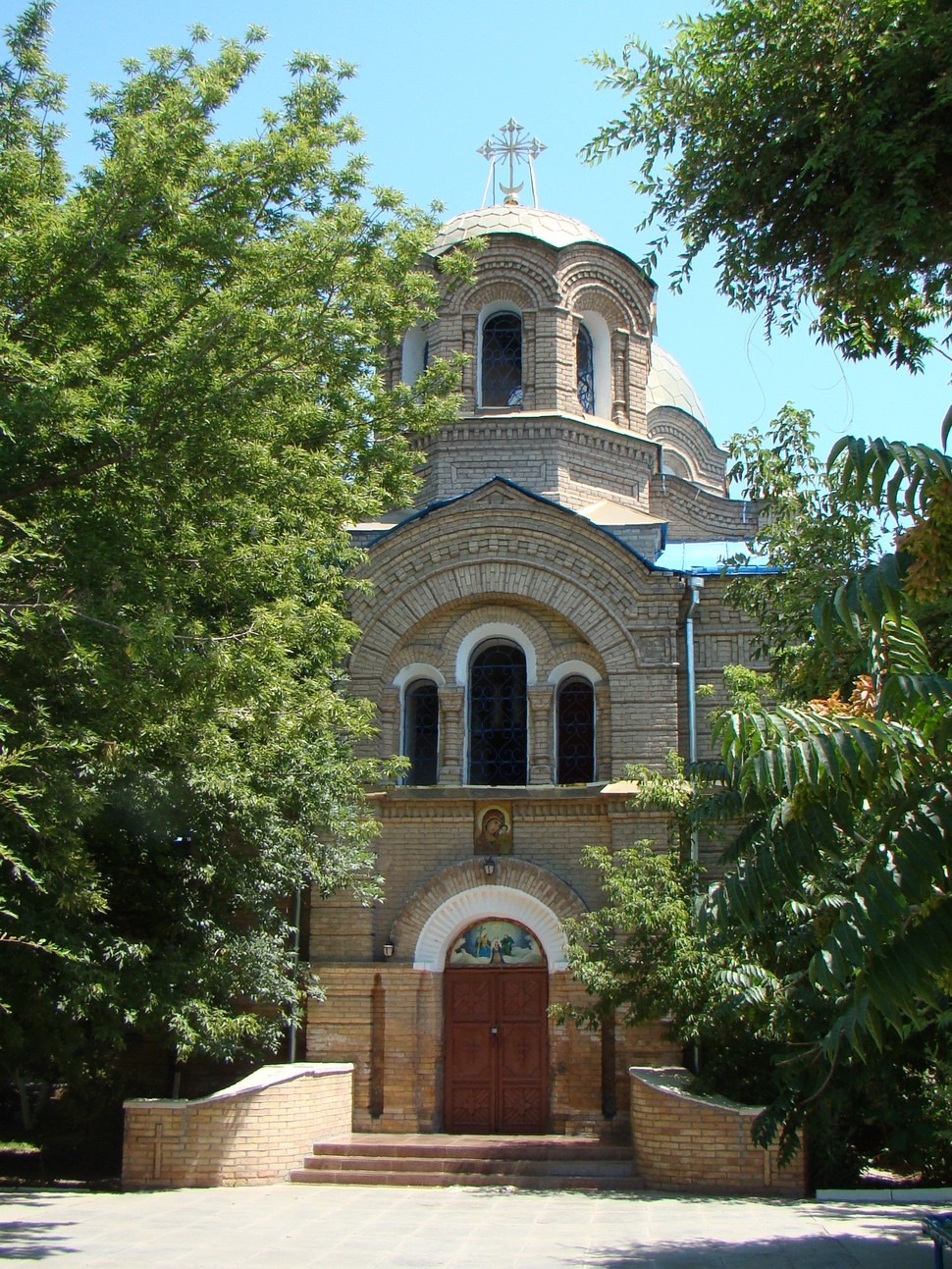 Свято-Казанский храм иконы Божией Матери в Кызылорде. Постройка 1890-1895 годы.